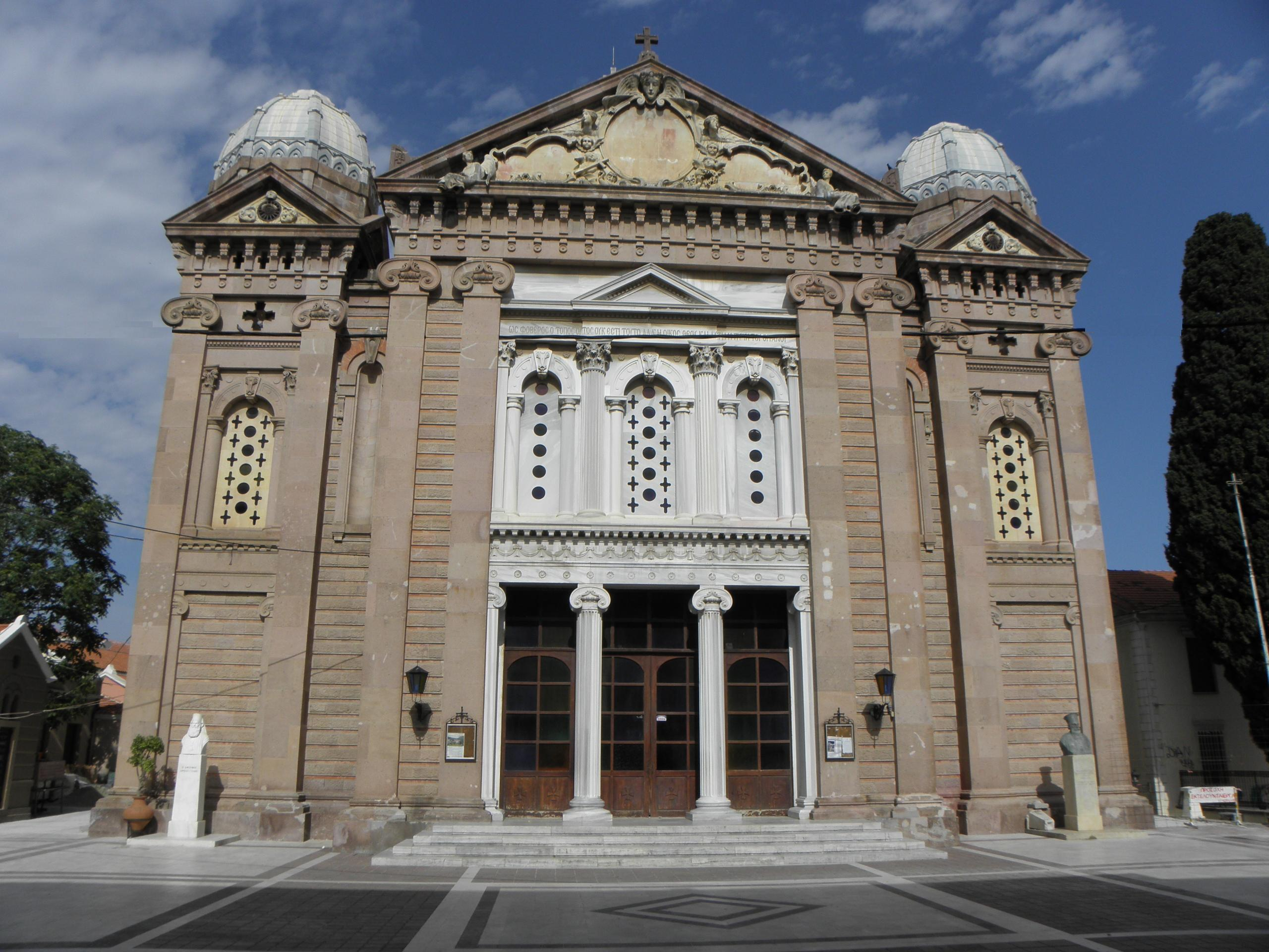 Katedrála v Mytiléně, Lesbos